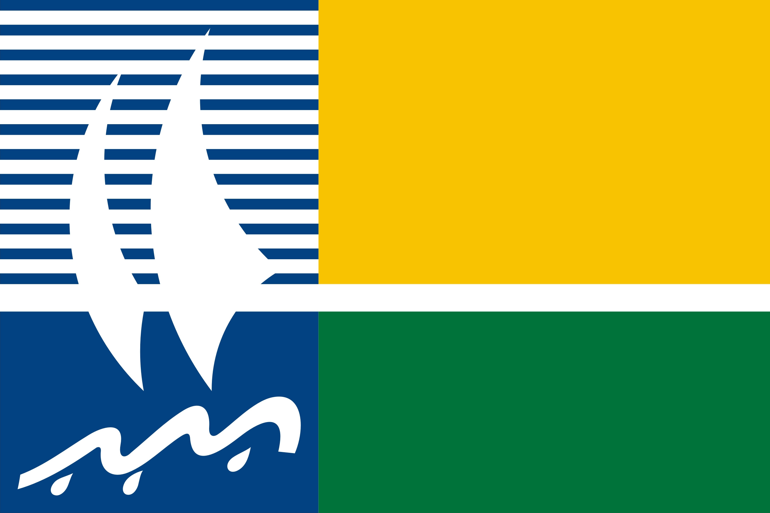 Bandeira de São José de Ribamar.